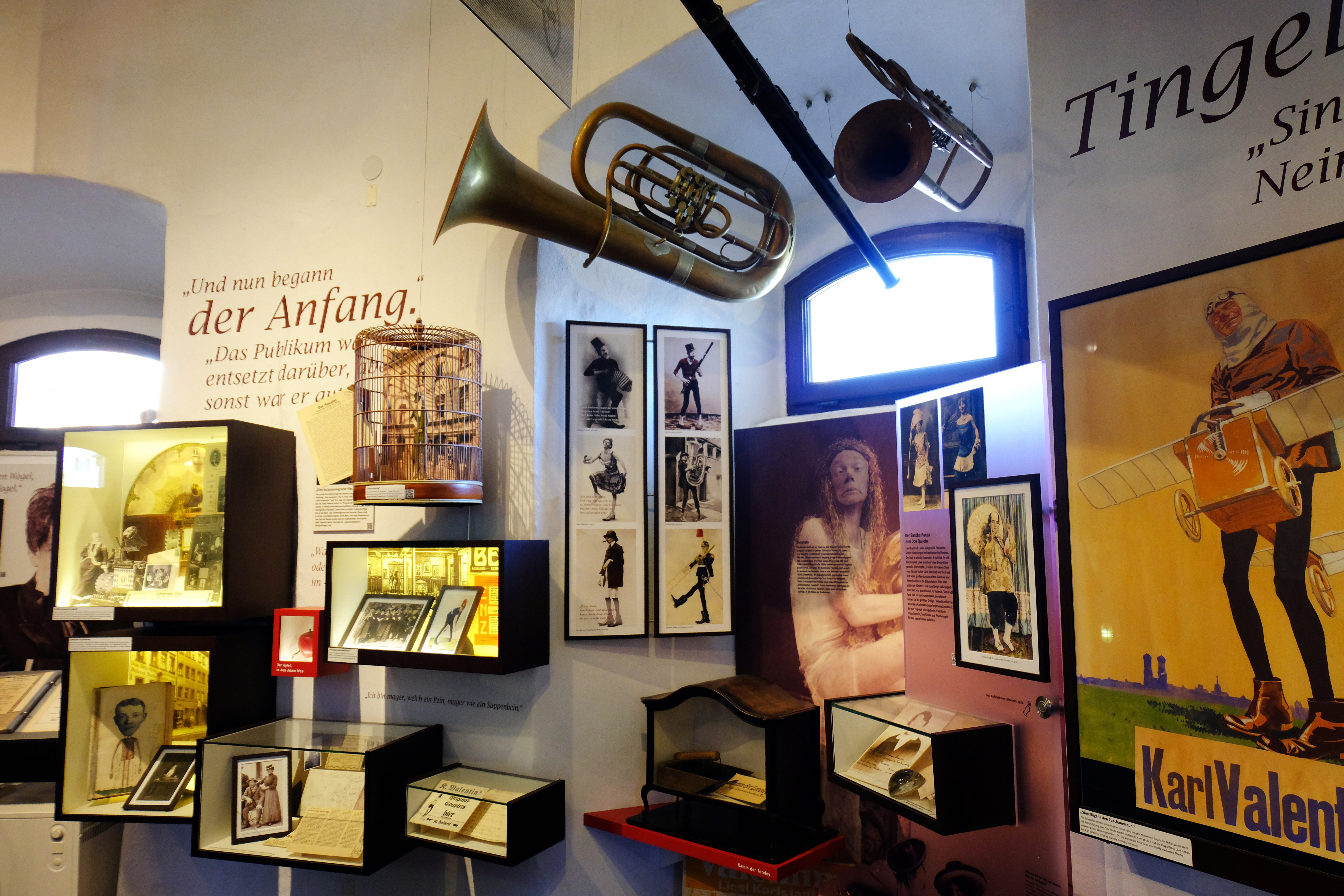 Blick in die Dauerausstellung des Valentin-Musäums mit Exponaten zu Liesl Karlstadt und Karl Valentin (2020)